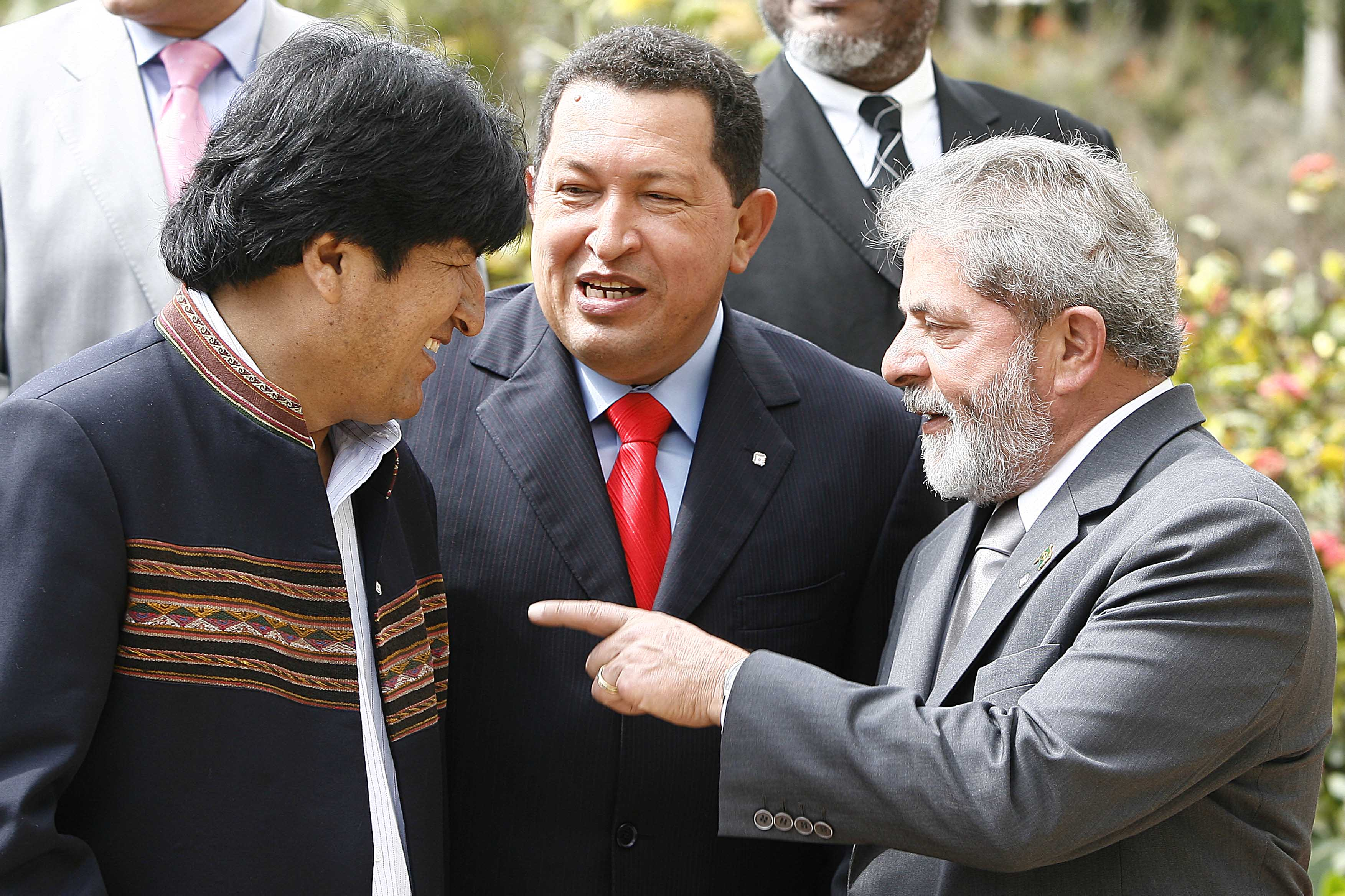 Ilha Margarita (Venezuela) - Os presidentes Luiz Inácio Lula da Silva, Hugo Chávez (Venezuela) e Evo Morales (Bolívia) conversam durante encontro da Cúpula Energética da Comunidade Sul-Americana de Nações.